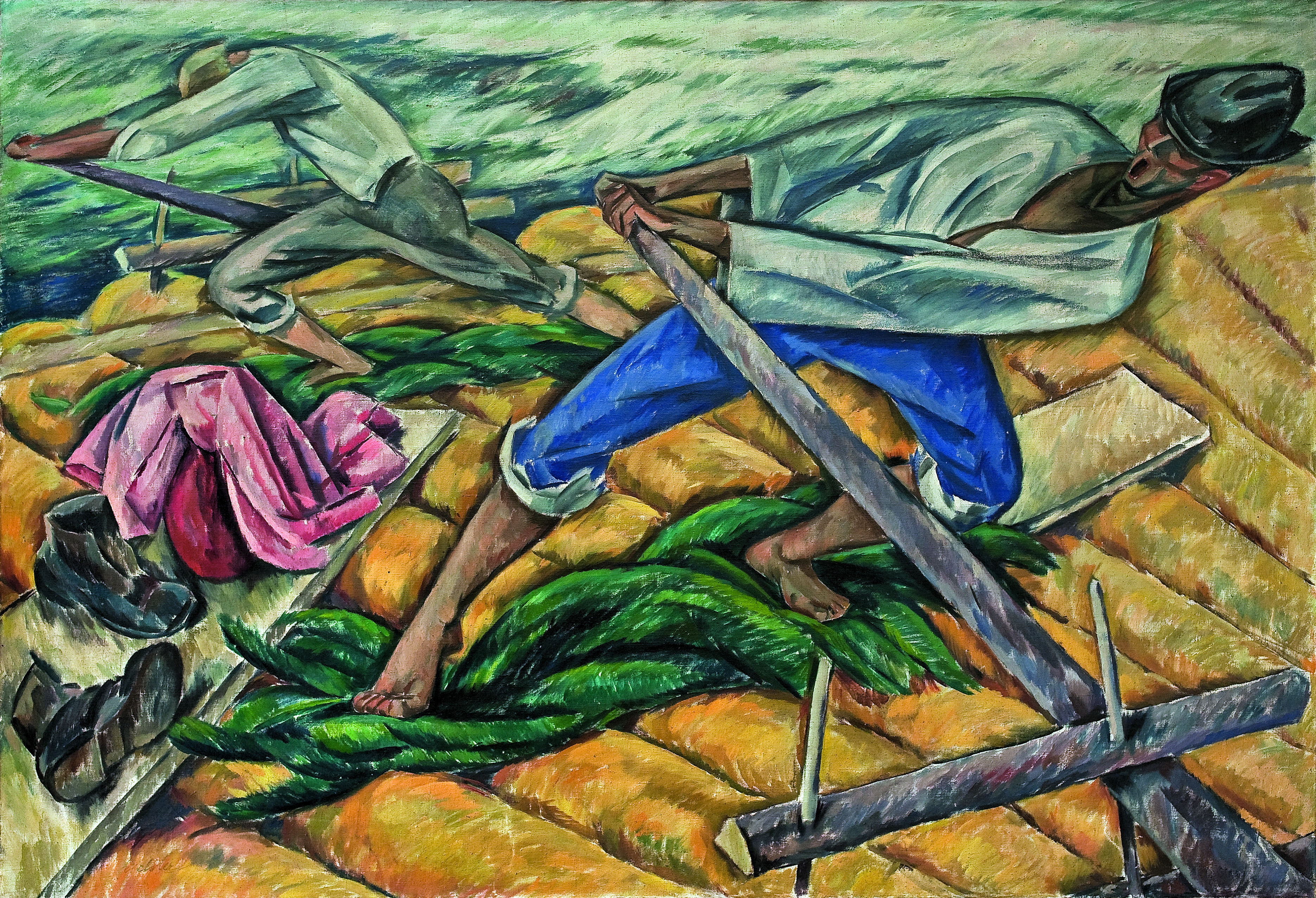 Erwin Elster - obraz olejny